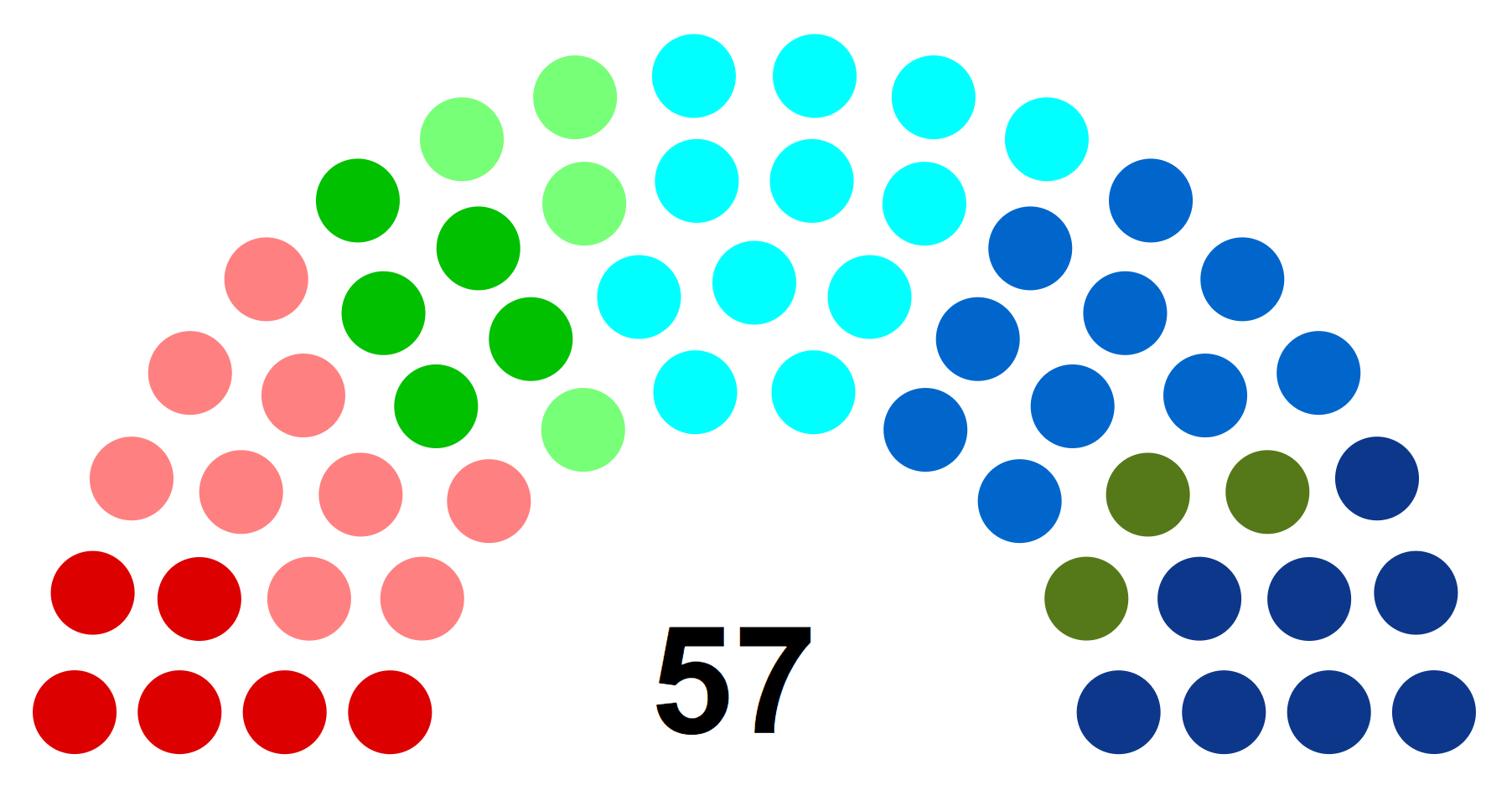 Partis politiques représentés au Conseil régional de Picardie en 1992